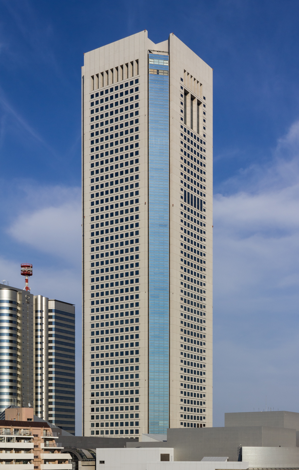 東京オペラシティタワー（東京都新宿区）